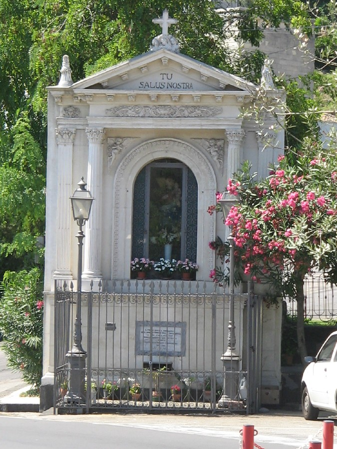 Altarino monumentale della Madonna della Provvidenza (1861) - Zafferana Etnea (CT) - Foto D. Pennisi.